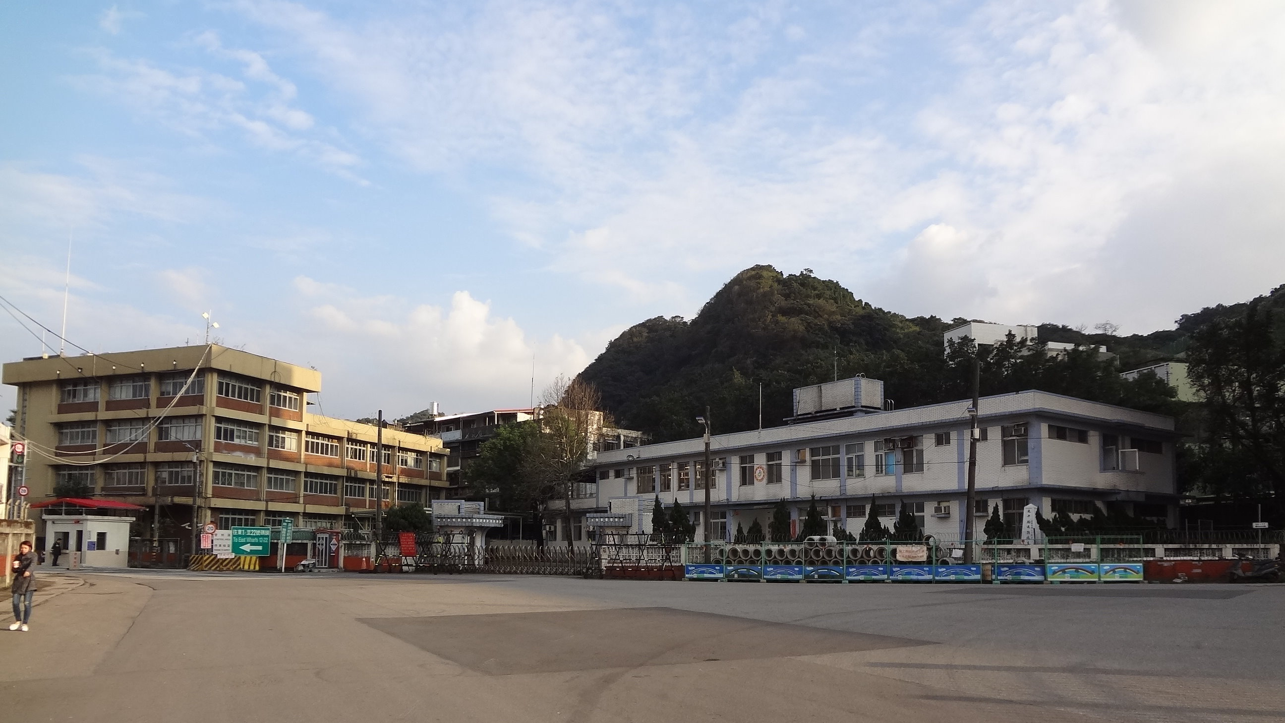 海軍基隆後勤支援指揮部，位於基隆市中正區東海街，無門牌。後方即是基隆法國公墓。